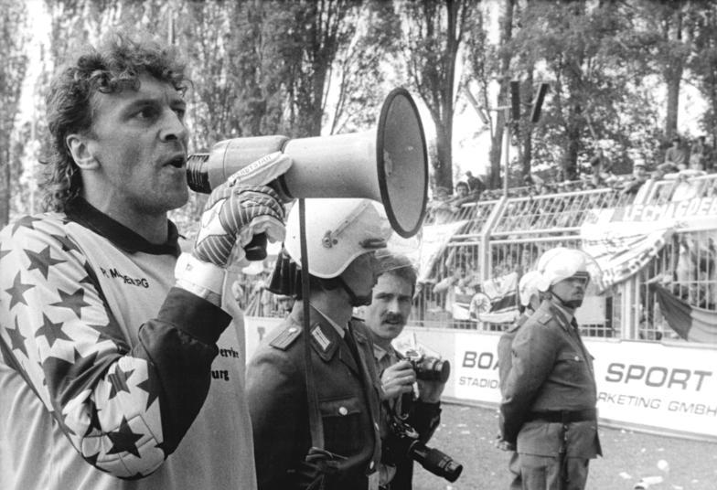 ADN-Kasper-26.5.90-Karl-Marx-Stadt (Chemnitz)-Fußball-Oberliga Chemnitzer FC - 1. FC Magdeburg Krawalle auf der Zuschauertribühne der Gäste überschatteten das Match im Dr.-Kurt-Fischer-Stadion der Bezirksstadt. Nachdem Feuerwerkskörper von den Rängen geflogen waren und das Spiel daraufhin unterbrochen werden mußte, rief Magdeburgs Torwart Dirk Heyne die Fans per Megaphon zur Ruhe auf.